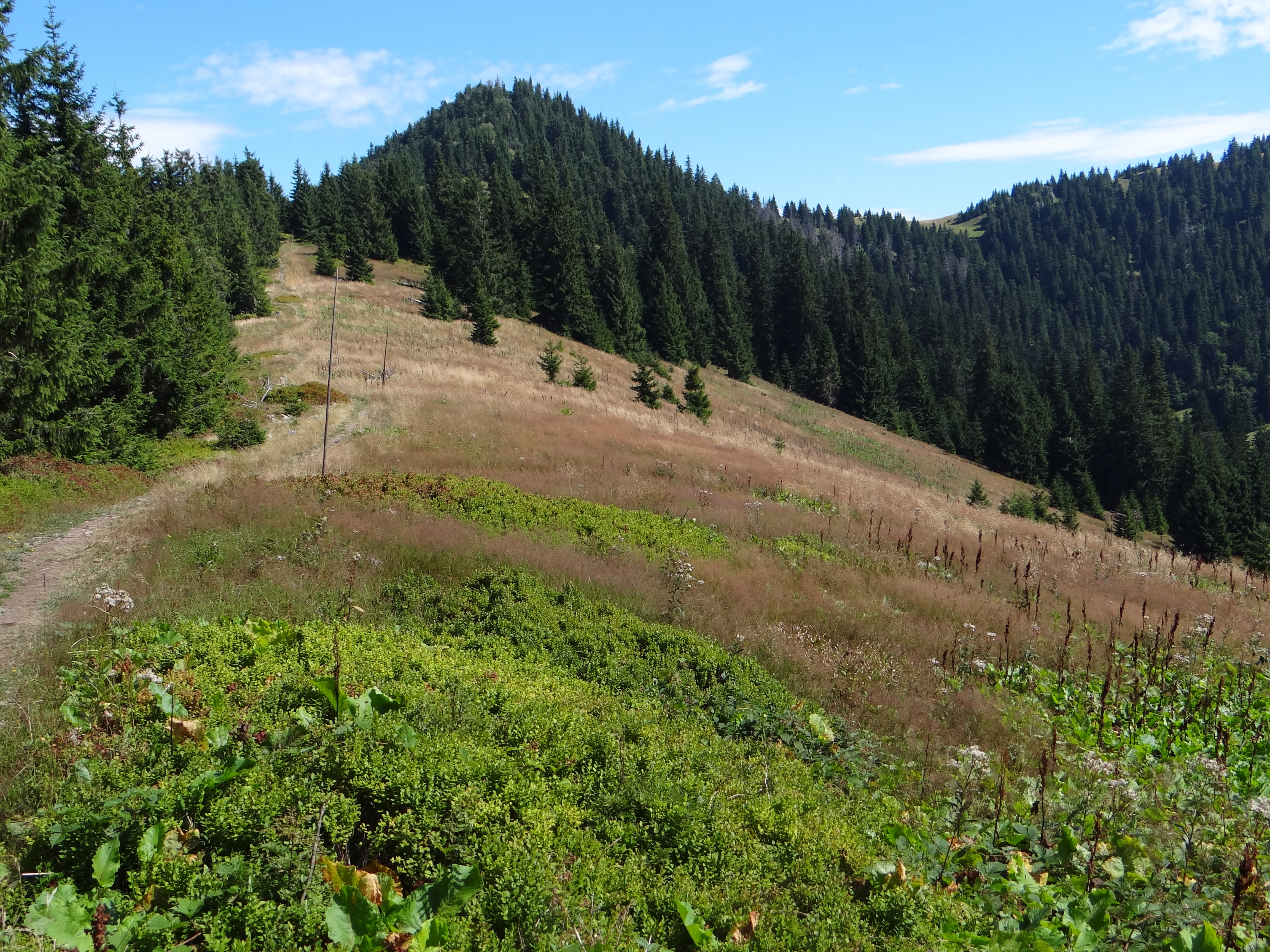 Šiprúň